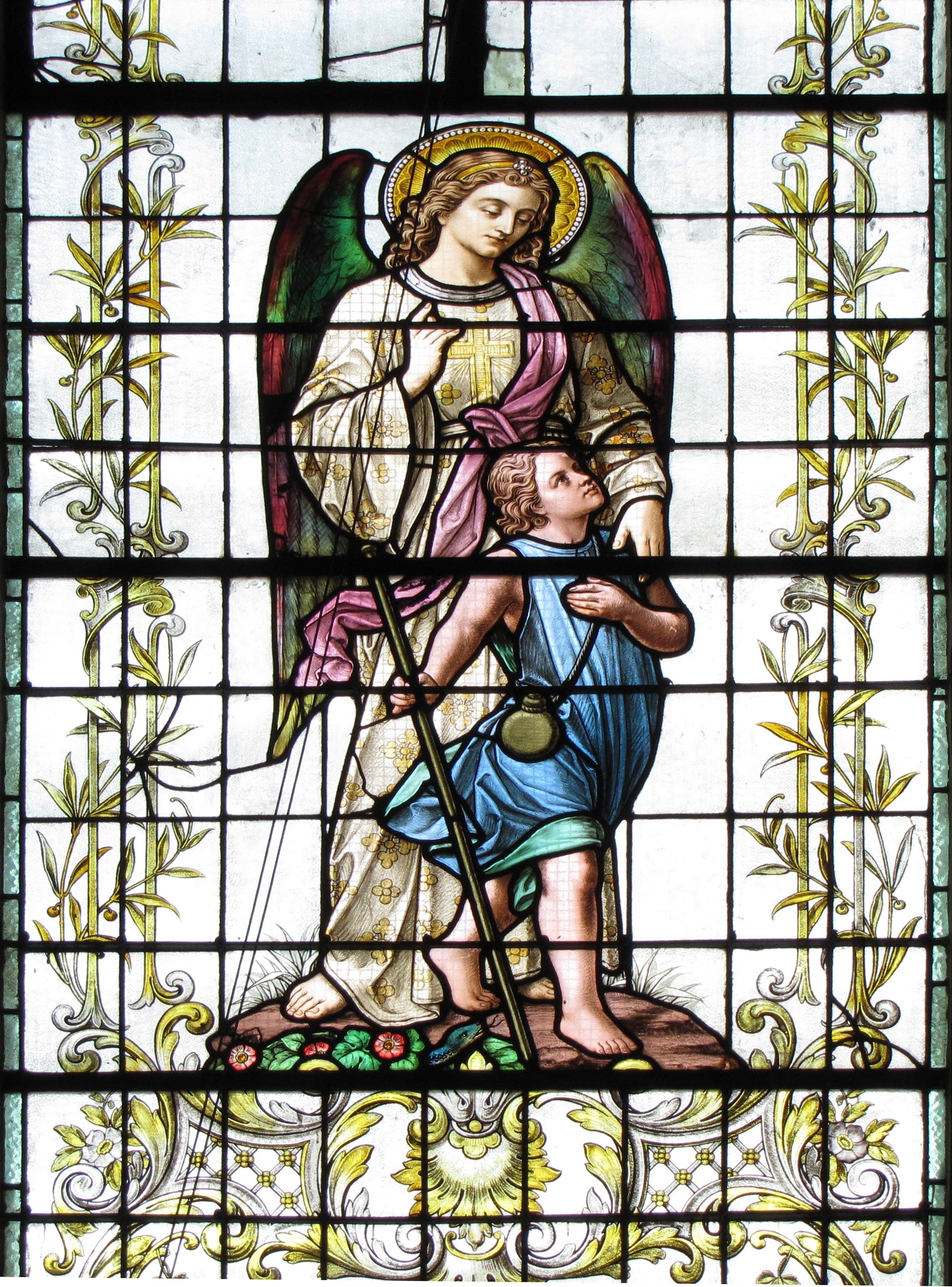 Alsace, Bas-Rhin, Église Saint-Maurice de Fegersheim (PA00132525, IA00023146). Verrière de la nef "Tobias et l'ange" (Ott Frères, XXe).